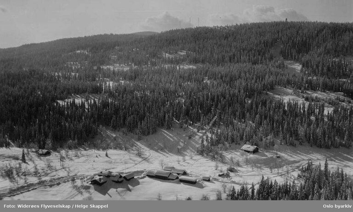 Ullevålseter med Skjennungsåsen bak.